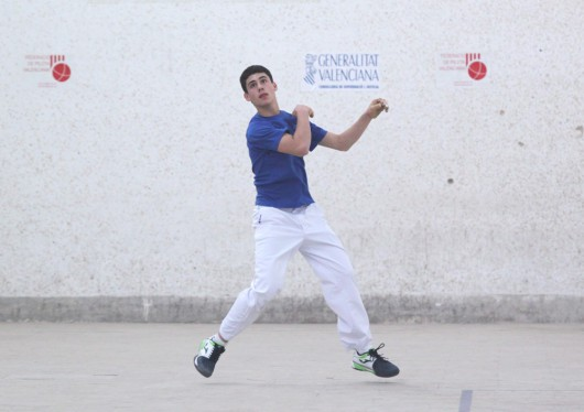 Lluís de la Vega jugant.